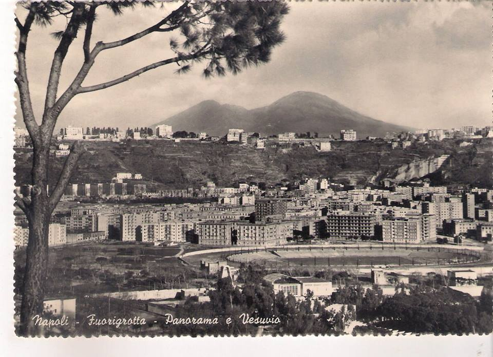 "Napoli - Fuorigrotta - Panorama e Vesuvio". Stadio San Paolo in costruzione. Cartolina. Autore sconosciuto.